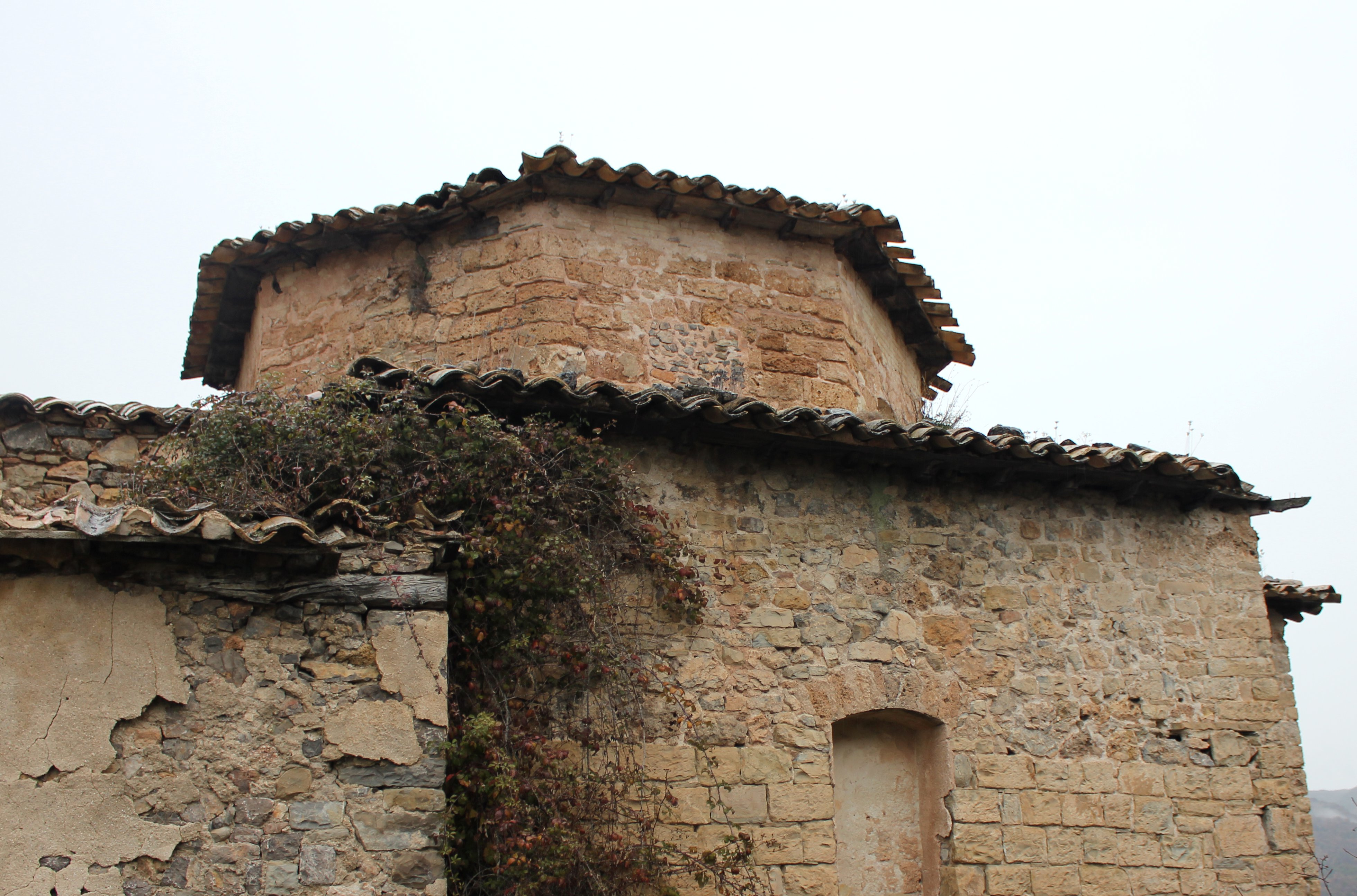 Aragonés: Cimborriet d'a ilesia de Sant Andreu de Trillo (A Fueva, Sobrarbe).